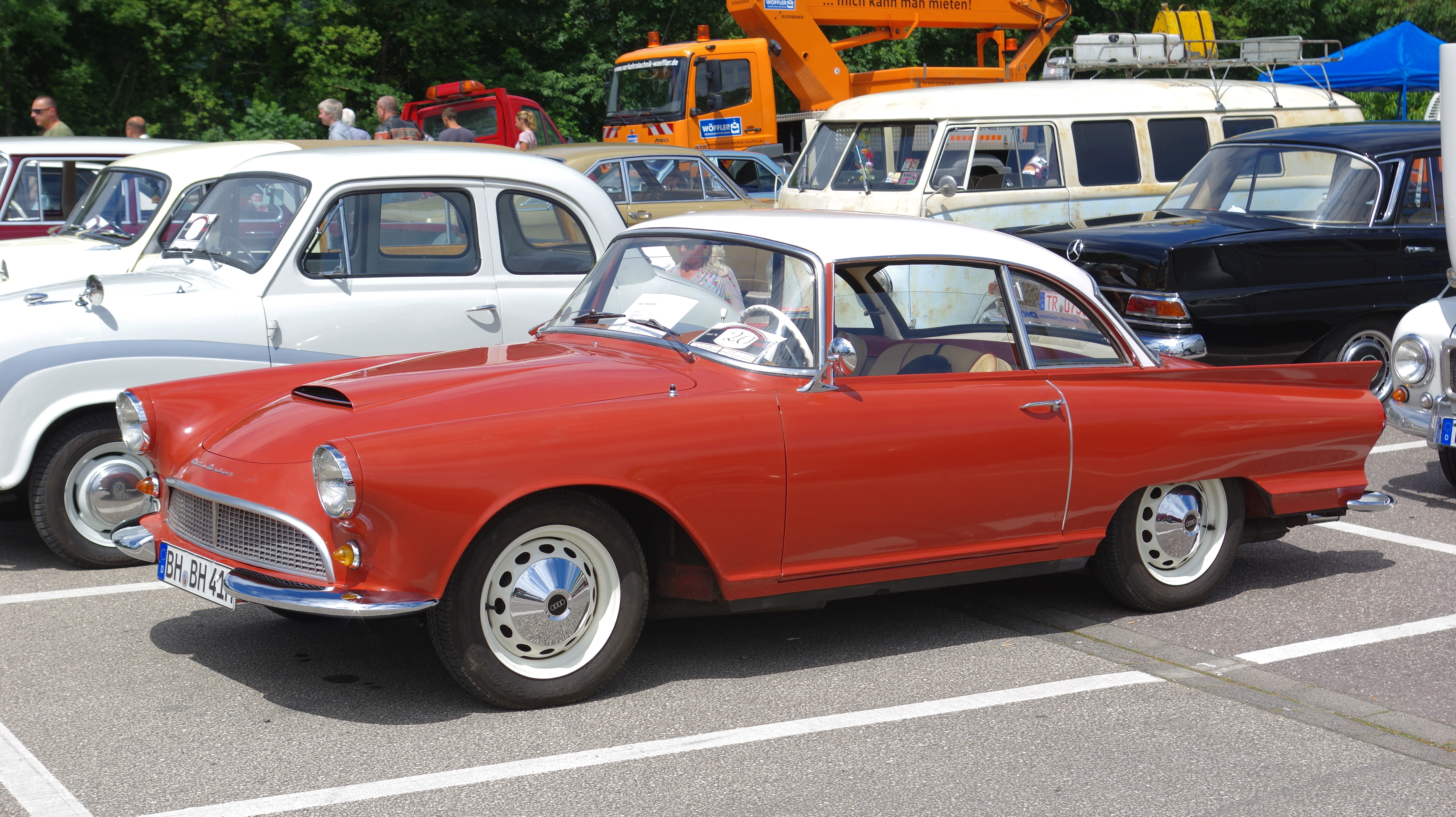 Auto Union 1000 SP, 1958, 55 PS , 32. Internationales Oldtimer Treffen Konz 2016, Das Nummernschild ist verfälscht!